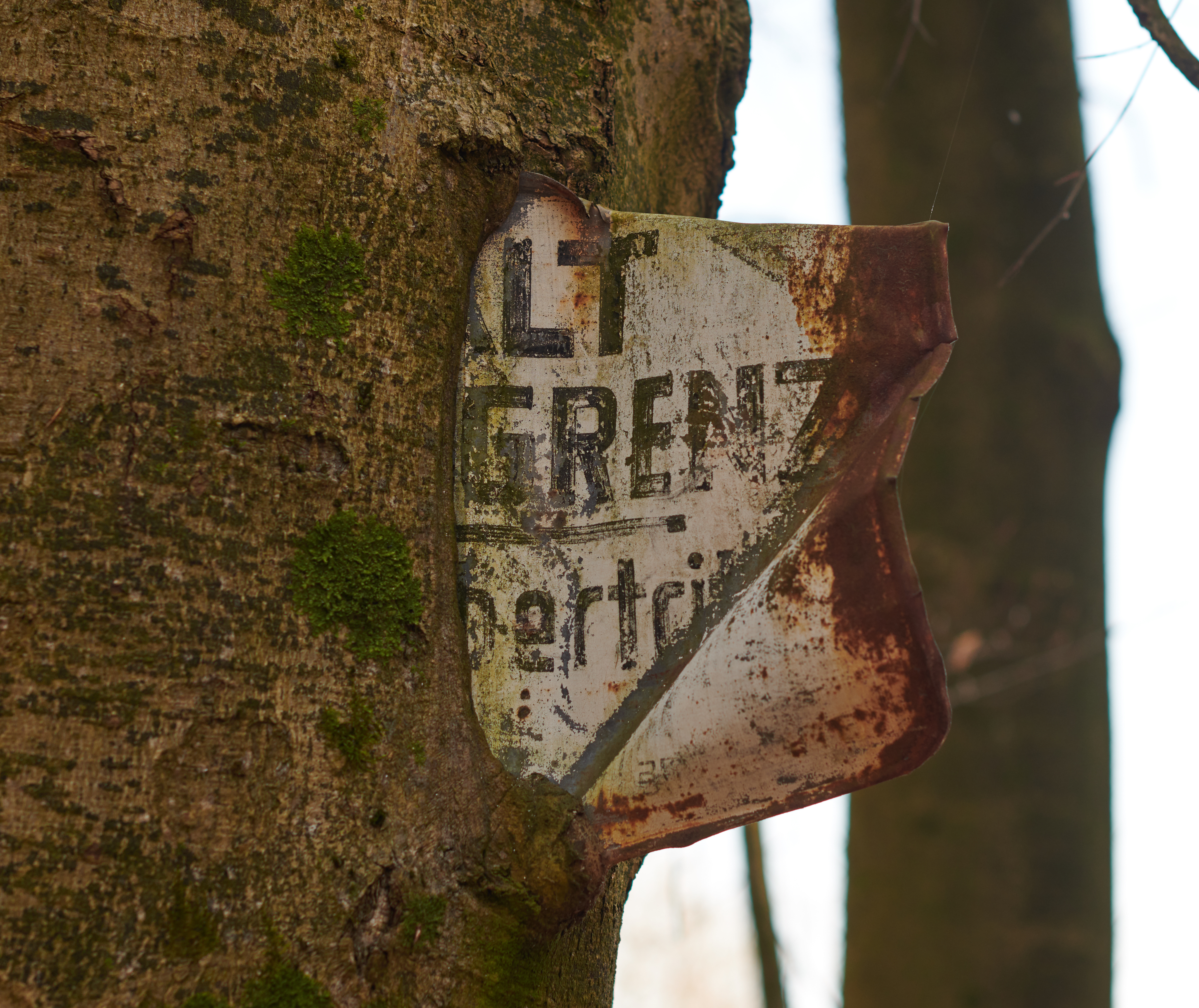 Eiserne Hand: Zugewachsenes Grenzschild